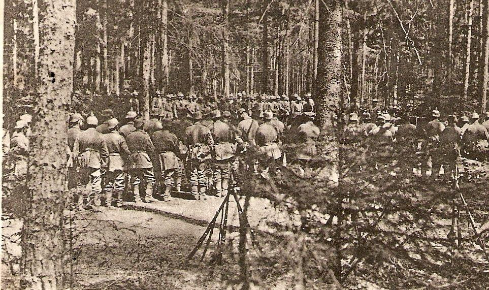 Wojska niemieckie w lesie pod Obórkami w powiecie przasnyskim w czasie I wojny światowej